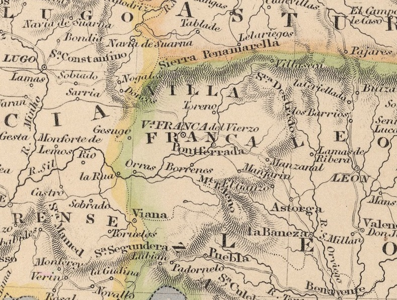 Detalle de la provincia de Villafranca del Bierzo existente en 1822-1823 en el mapa "Spain & Portugal", realizado en 1831 por John Dower